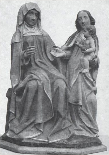 Heßheim, katholische Pfarrkirche, "Anna Selbdritt" Figur, um 1470, aus dem Kloster Maria Münster, Worms